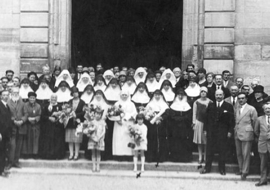 Remise de la Médaille honneur Assistance Publique à soeur Marie-Gabriel 1928